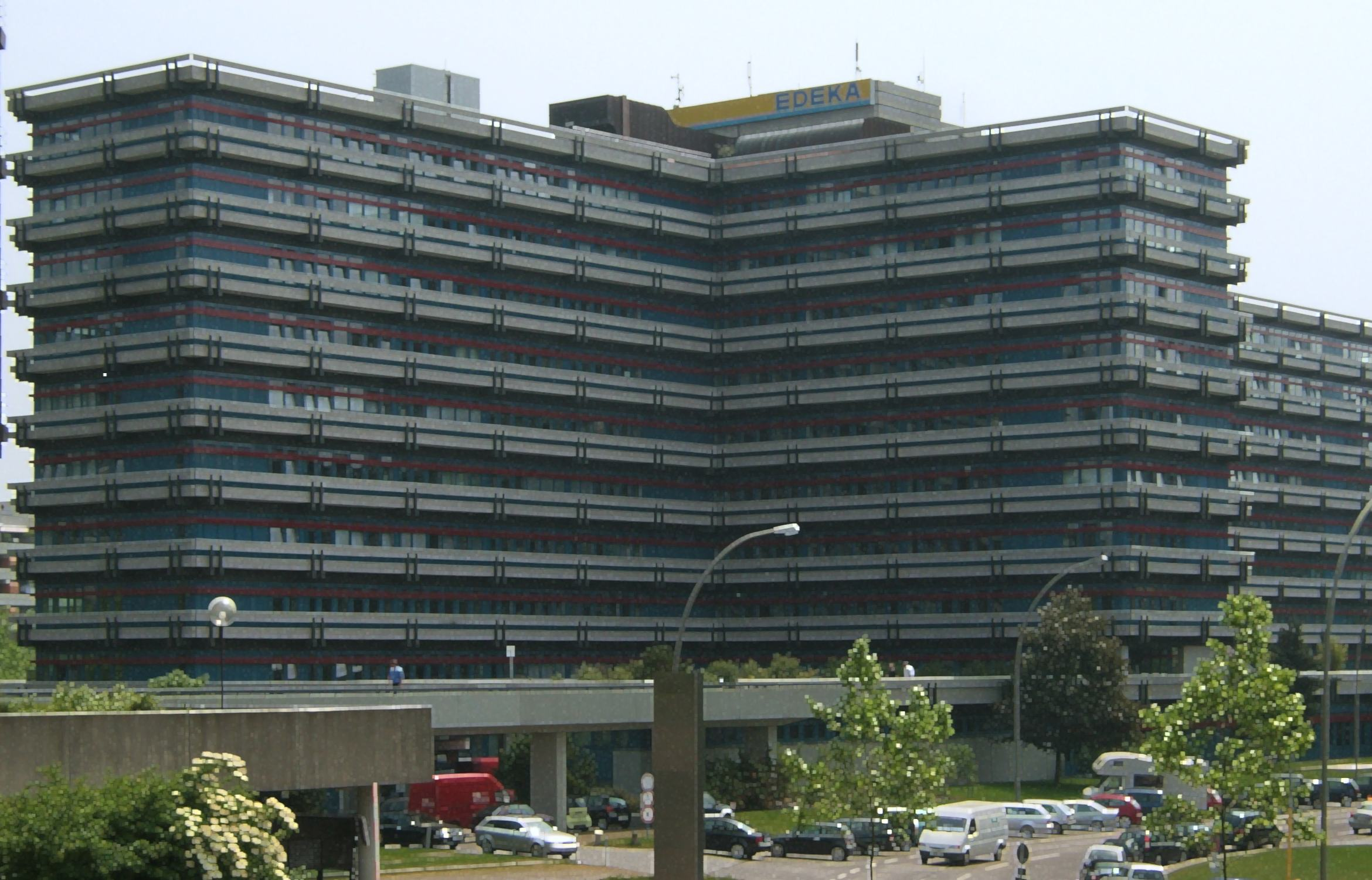 Bildbeschreibung: Hamburg, City-Nord, Verwaltung der EDEKA Fotograf: selbst Datum: 14.6.2006